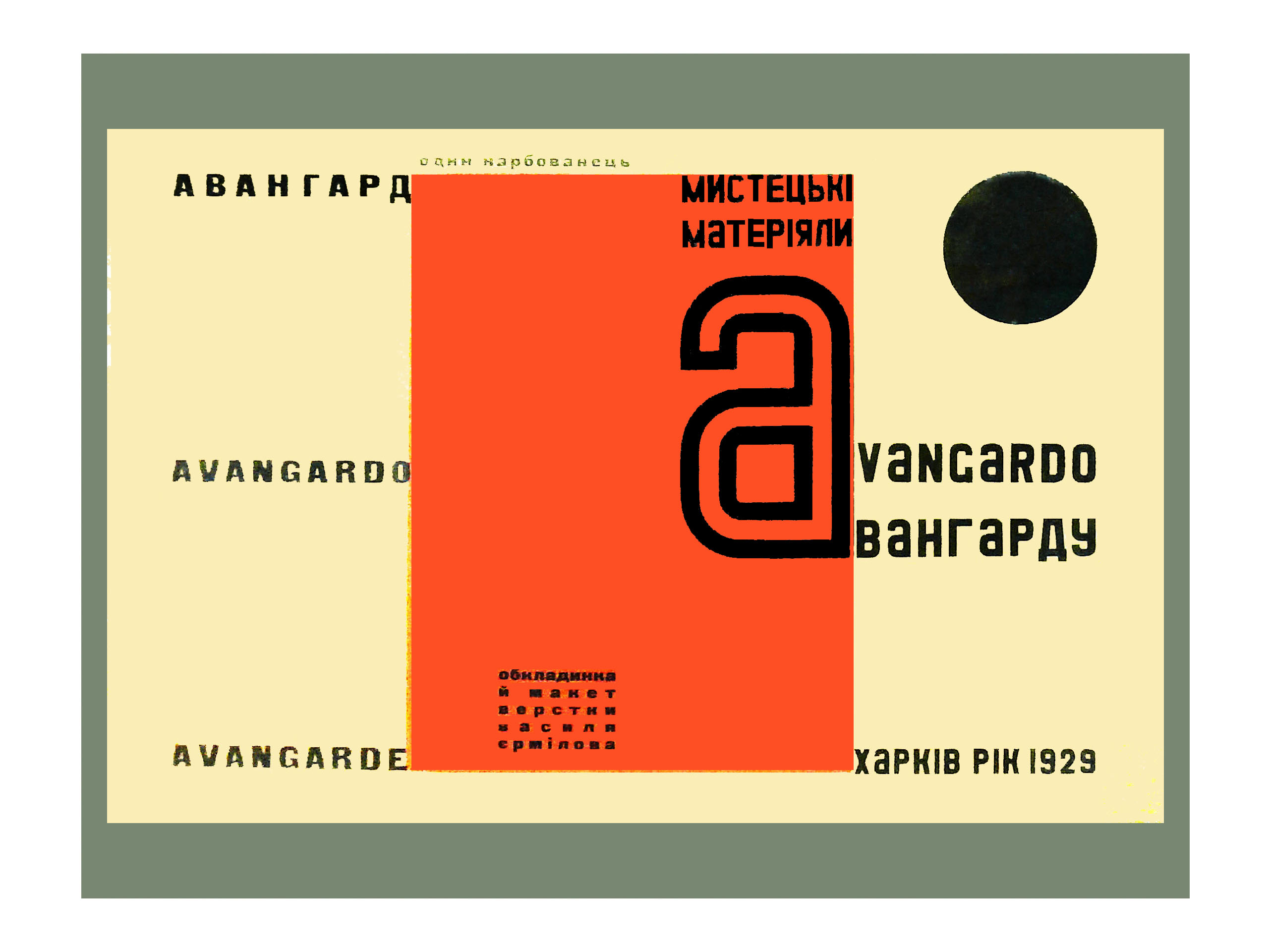 Василь Єрмилов. Обкладинка часопису «Авангард», 1929. Папір, друк.